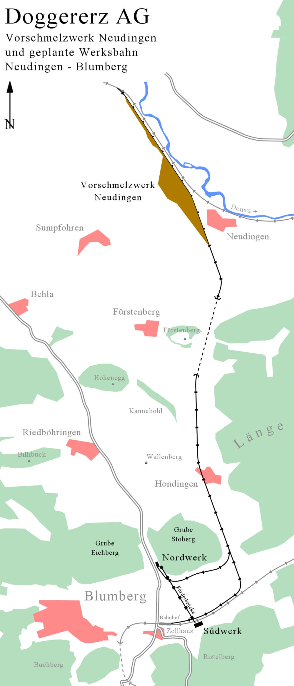 Planungen der Doggererz AG für eine Werksbahn von Blumberg zum Vorschmelzwerk in Neudingen. Kartengrundlage: Originalplan von 1939 oder 1940 beim Landesbergamt Freiburg, abgedruckt in: * Wolf-Ingo Seidelmann: Hochöfen in der Baar. In: Beiträge zur Landeskunde. Heft 1 1996, ISSN 0408-8492, S. 1–8, hier S. 1.